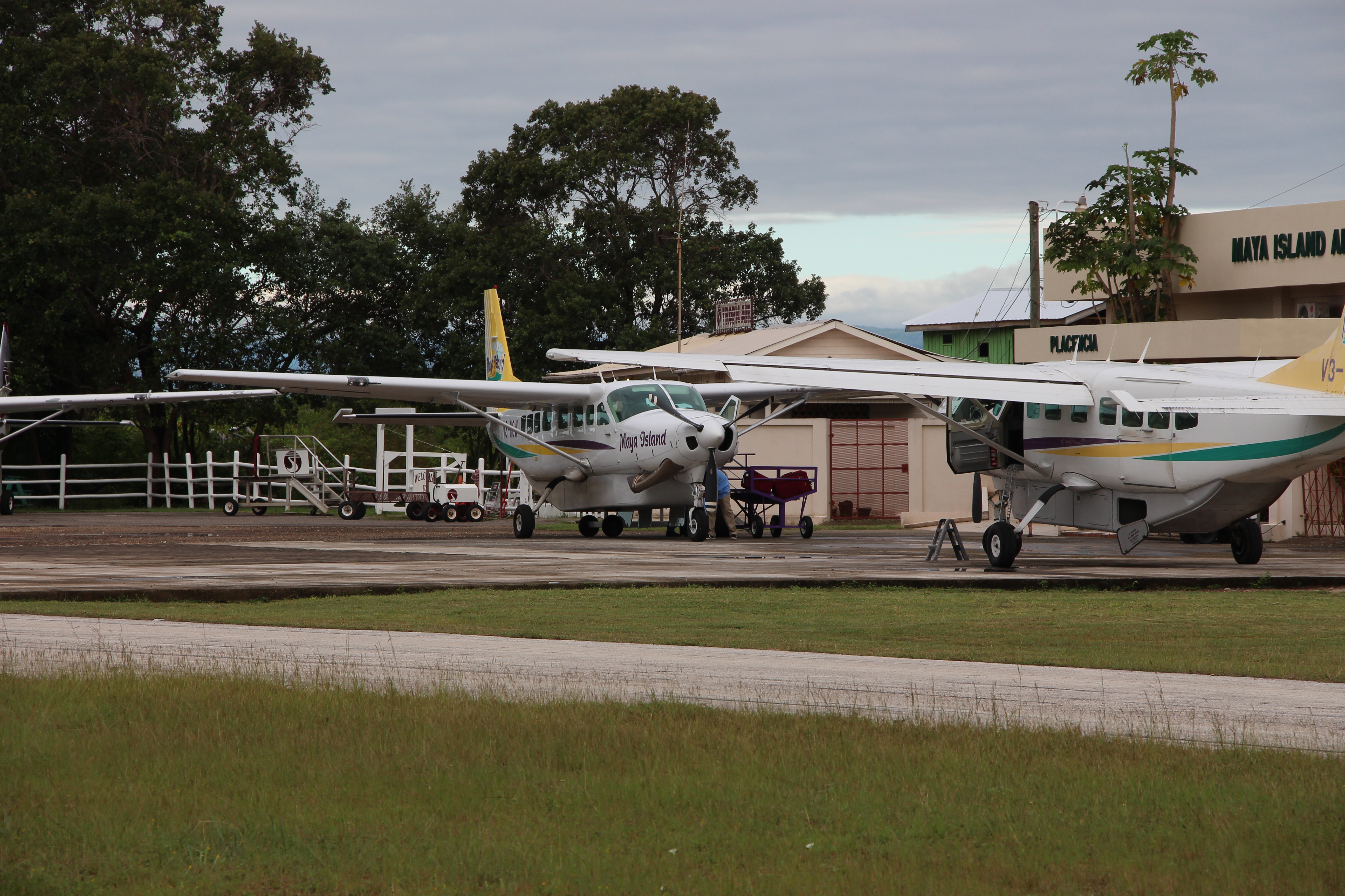 Maya Island Air, Flughafen Dangriga, Belize